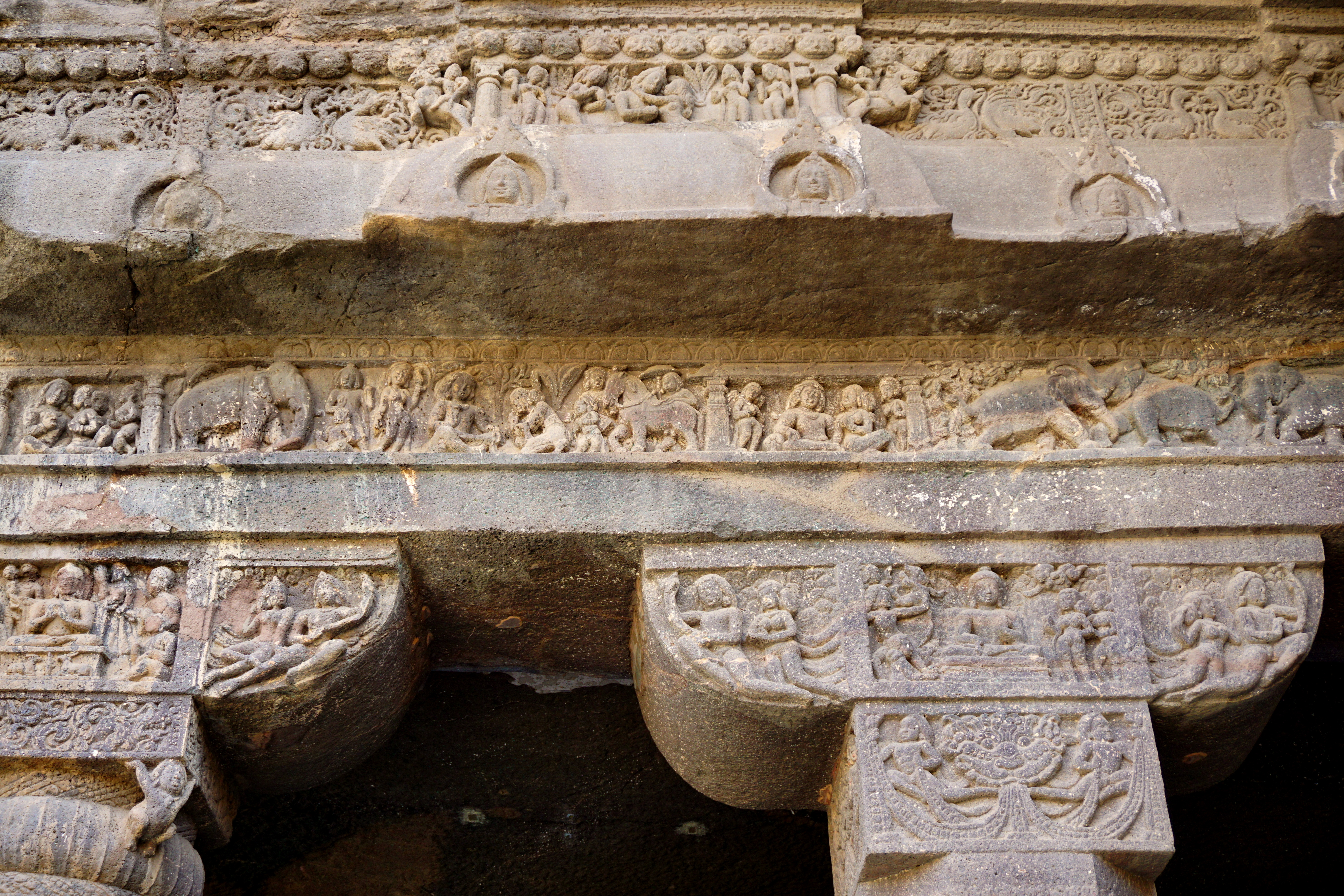 Ajanta Caves, Aurangabad, India